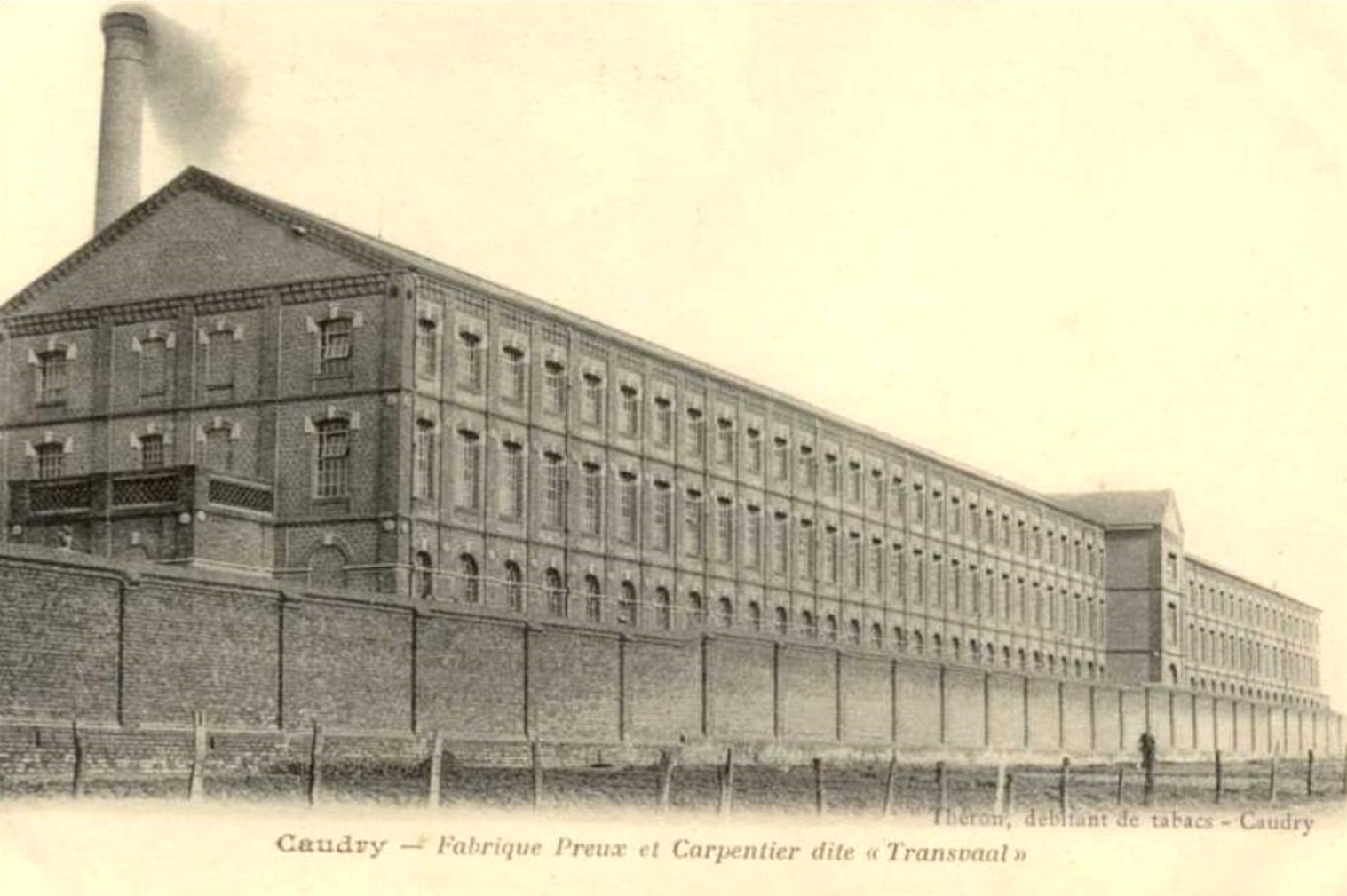 Fabrique Preux et Carpentier dite Transvaal à Caudry, Nord, Nord-Pas-de-Calais, France.